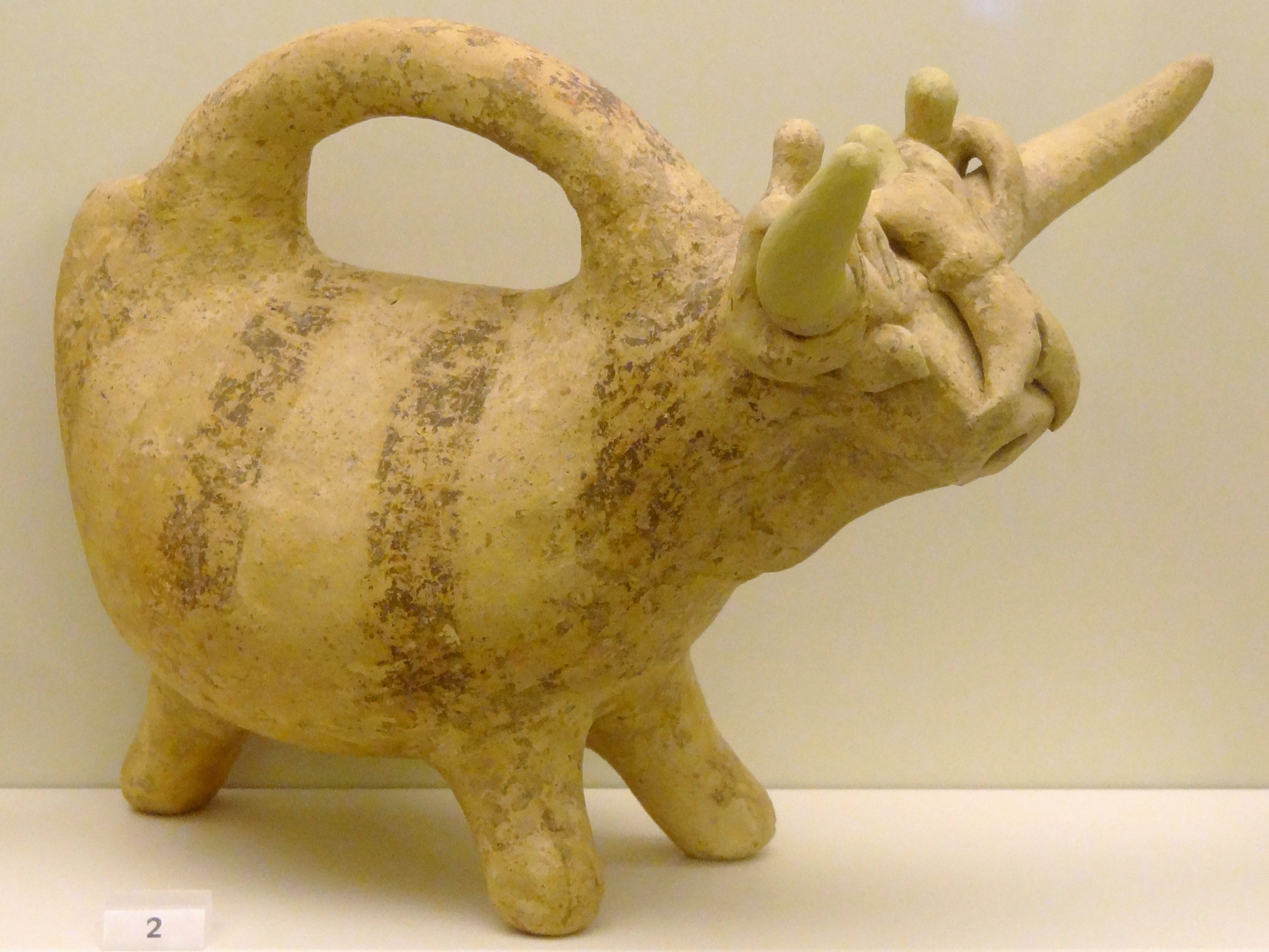 Tonrhyton in Form eines Stieres mit drei männlichen Figuren an Kopf und Hörnern (2000–1900 v. Chr.) aus Koumasa (Messara), ausgestellt im Archäologischen Museum Iraklio, Kreta, Griechenland